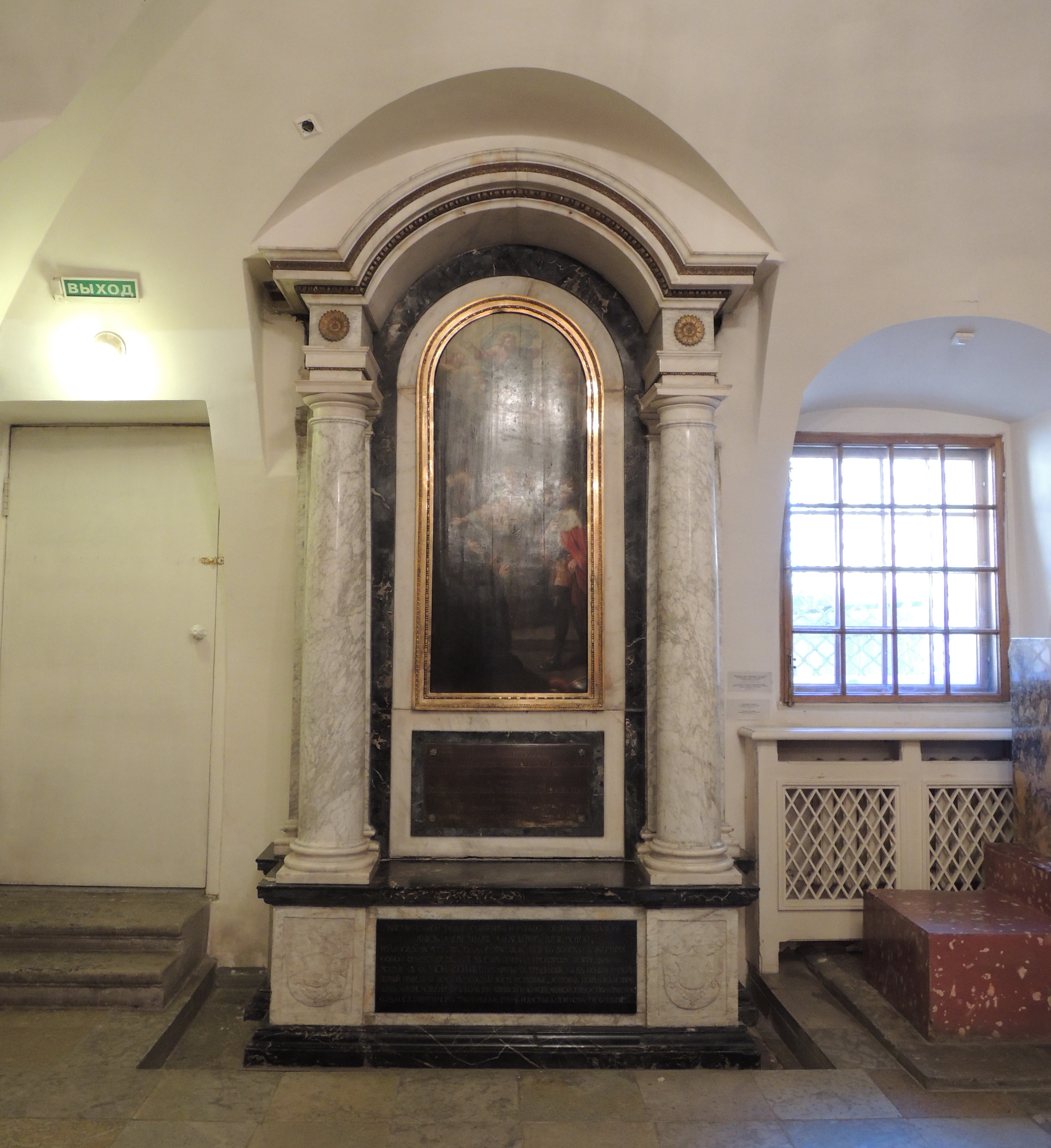 Благовещенская церковь Александро-Невской лавры. Вяземский, Александр Алексеевич, (1727—1793). Вяземская, Елена Никитична, ур. Трубецкая (1745—1832). Жена кн. А. А. Вяземского. Пристенный портал. Неизв. мастер, худ. П. М. Уткин, 1790-е гг. (Палатка Благовещенской церкви)